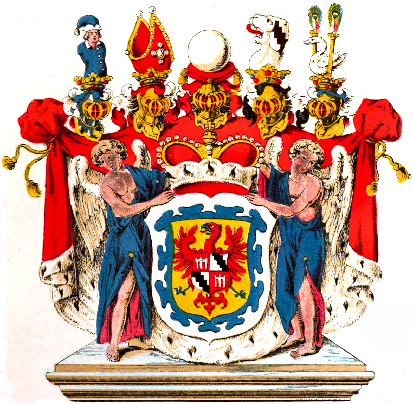 Wappen der Fürsten zu Fürstenberg, koloriert